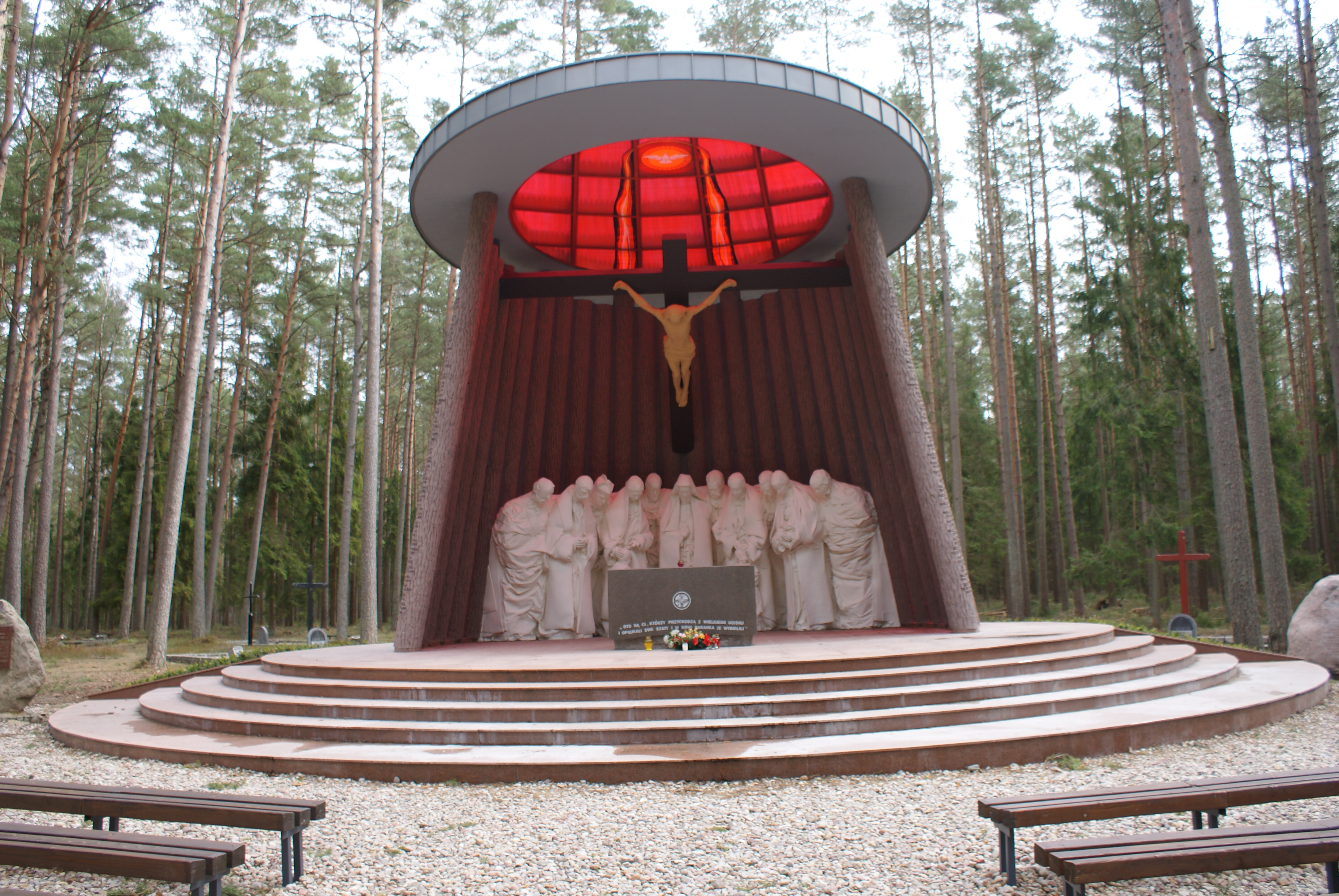 Kaplica-mauzoleum w lesie piaśnickim pod Wejherowem (odsłonięta w 2010).